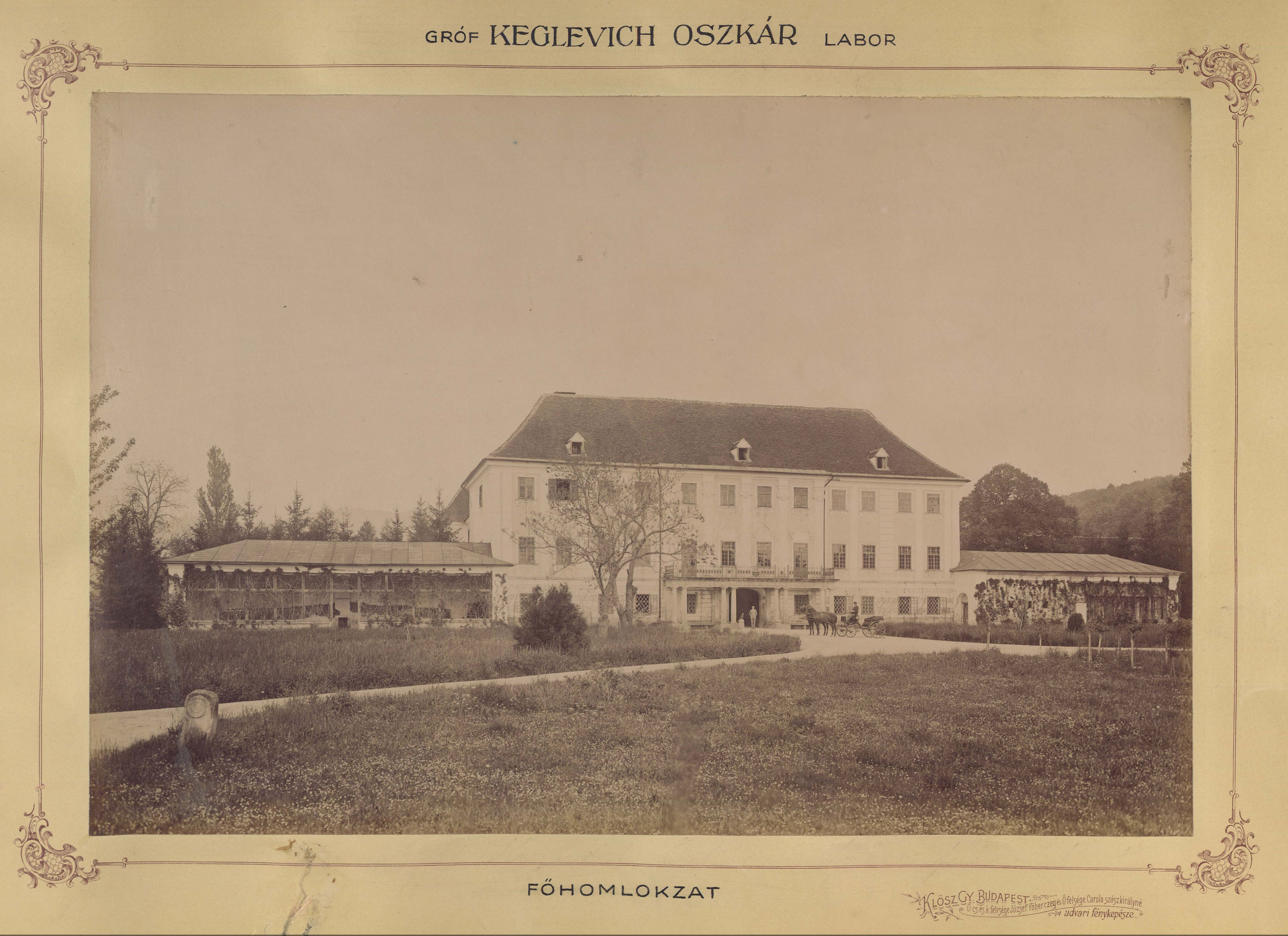 gróf Keglevich Oszkár, az Operaház egykori intendánsának kastélya, főhomlokzat. A felvétel 1895-1899 között készült. A kép forrását kérjük így adja meg: Fortepan / Budapest Főváros Levéltára. Levéltári jelzet: HU.BFL.XV.19.d.1.11.022 Location: Croatia, Lobor Tags: mansion